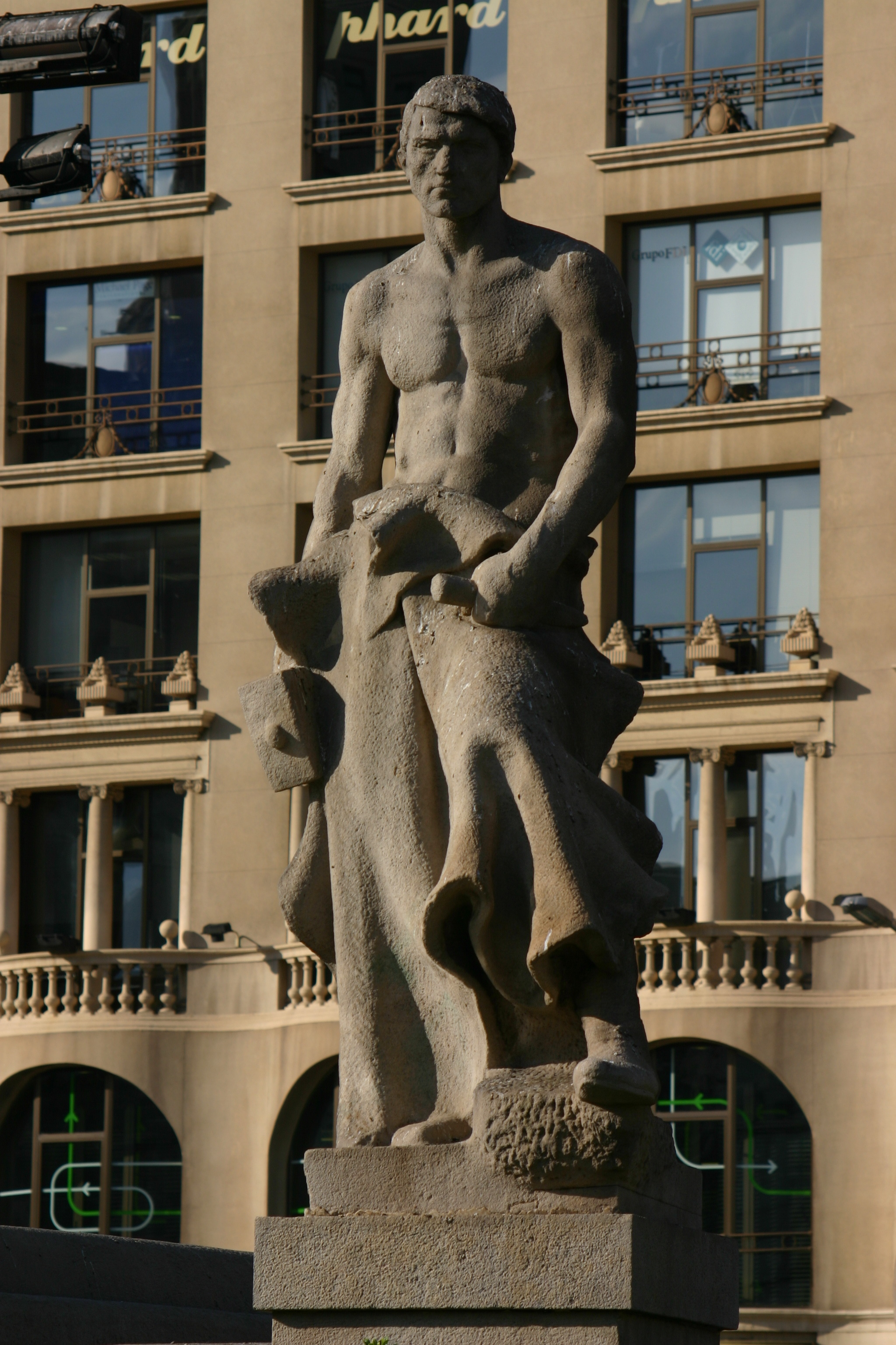 El Forjador. Plaza Catalunya. Barcelona (Spain)